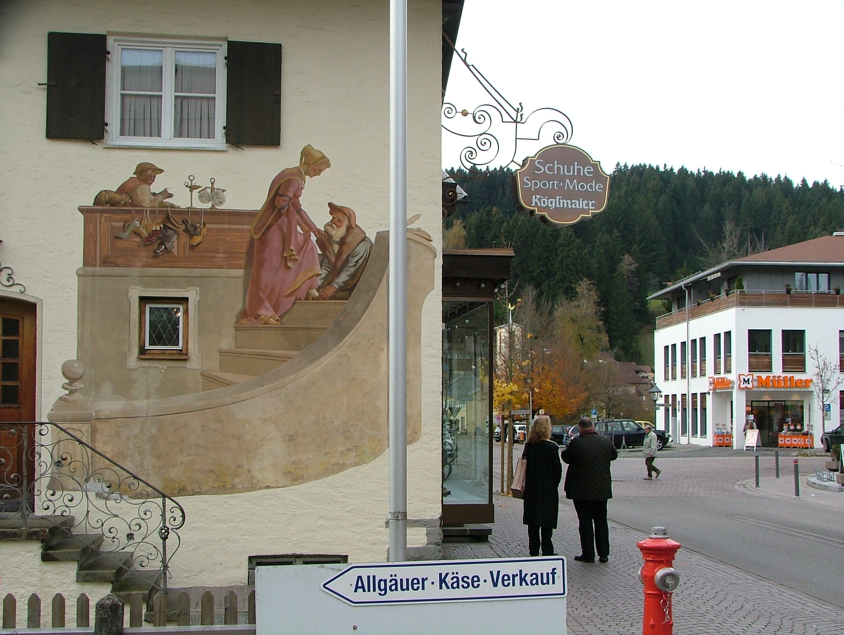 Schuhe